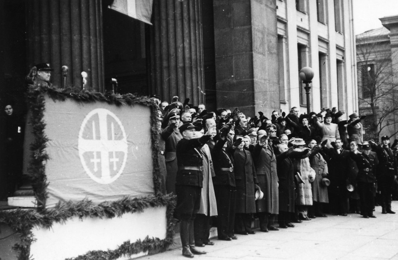 1941/11/01. RA/RAFA-3309/U 38B/9/38-9-11 img139